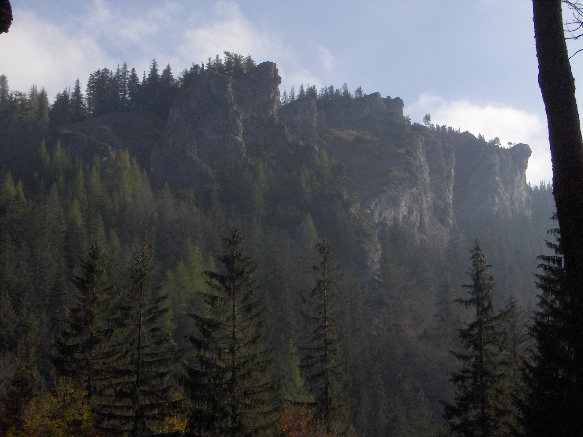 Nosal von Kuźnice